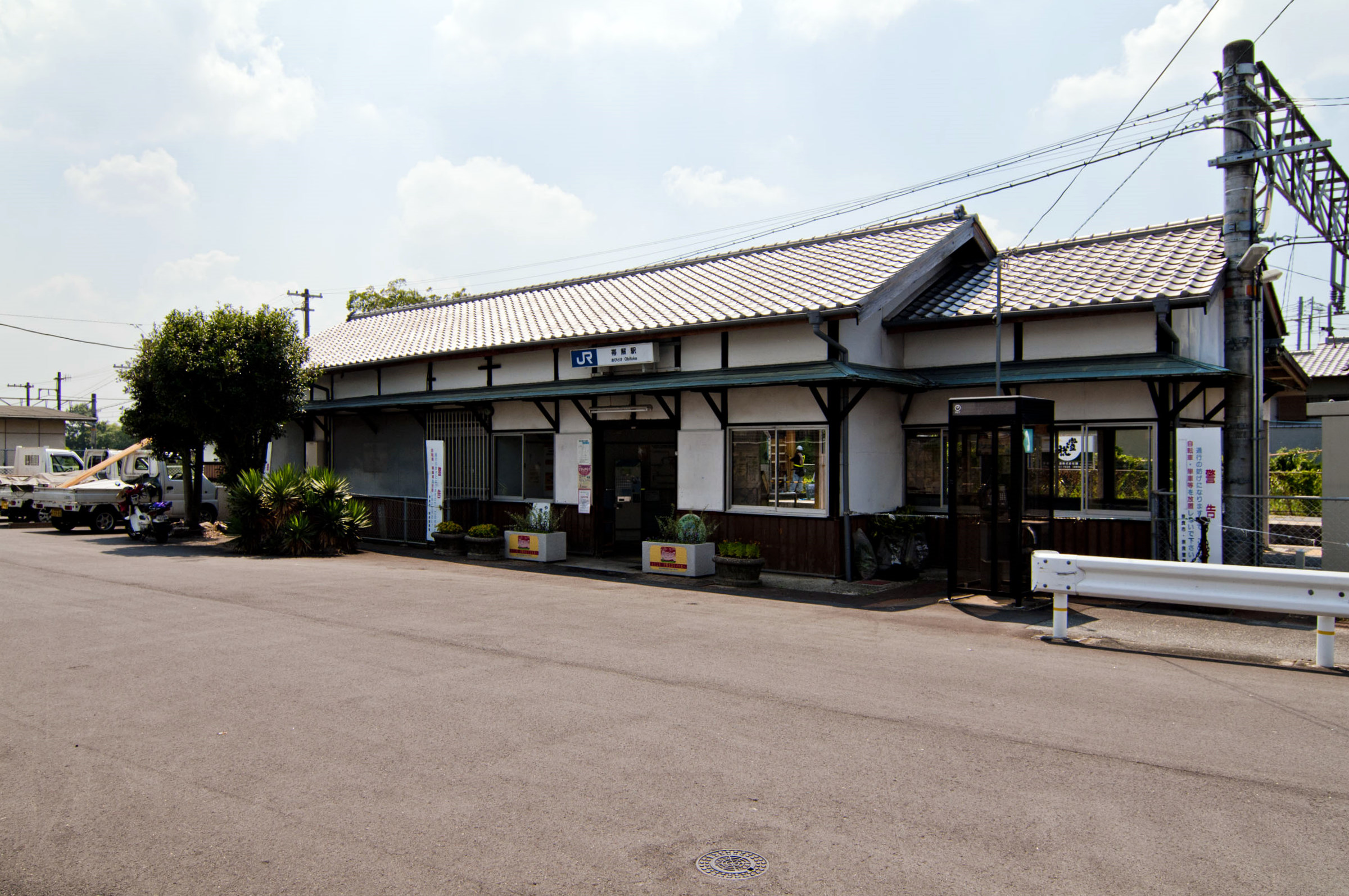 西日本旅客鉄道奈良線帯解駅